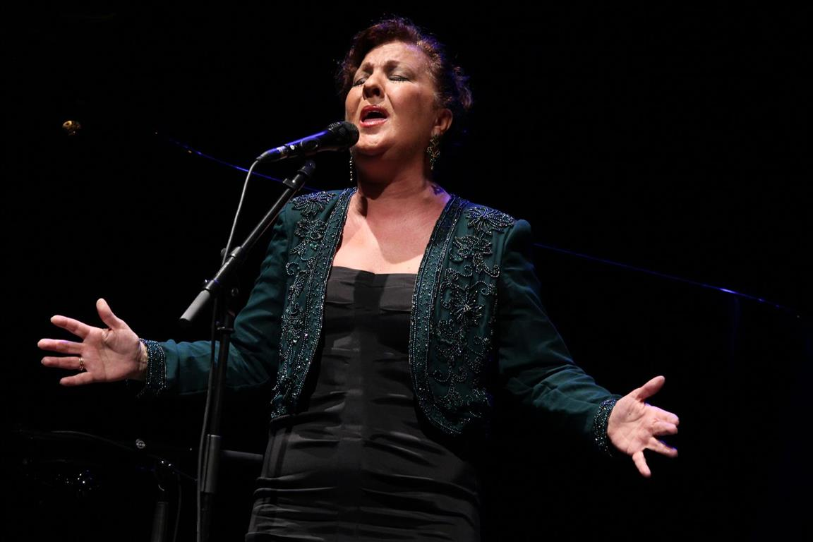 Recital en Teatros del Canal (Madrid, 2014)